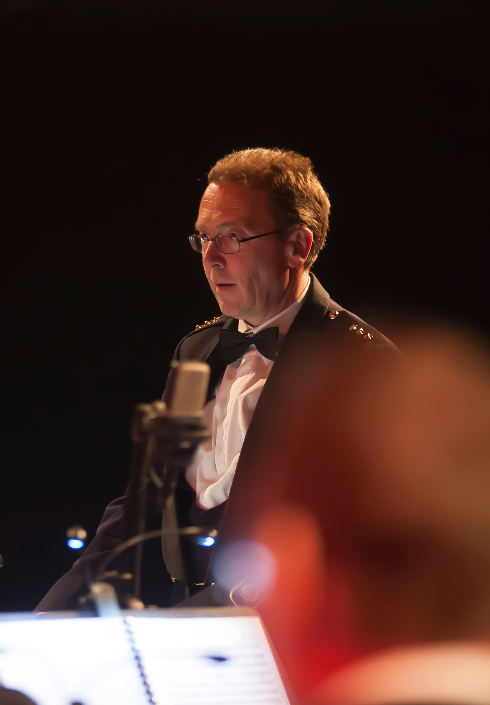 Chef-dirigent Harrie Wijenberg tijdens het korpsconcert 2014 in Theater De Flint te Amersfoort